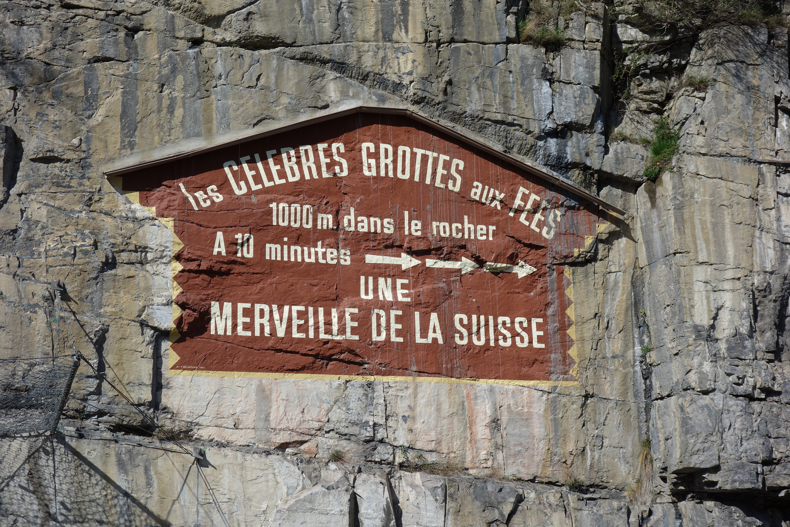 Grottes aux Fees, Saint-Maurice VS, Schweiz